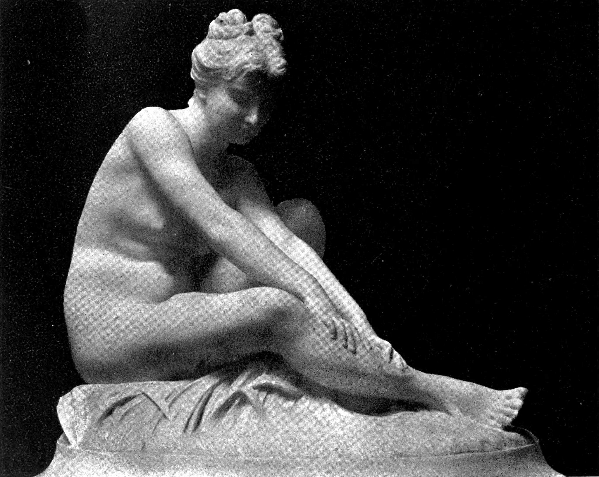 Baigneuse